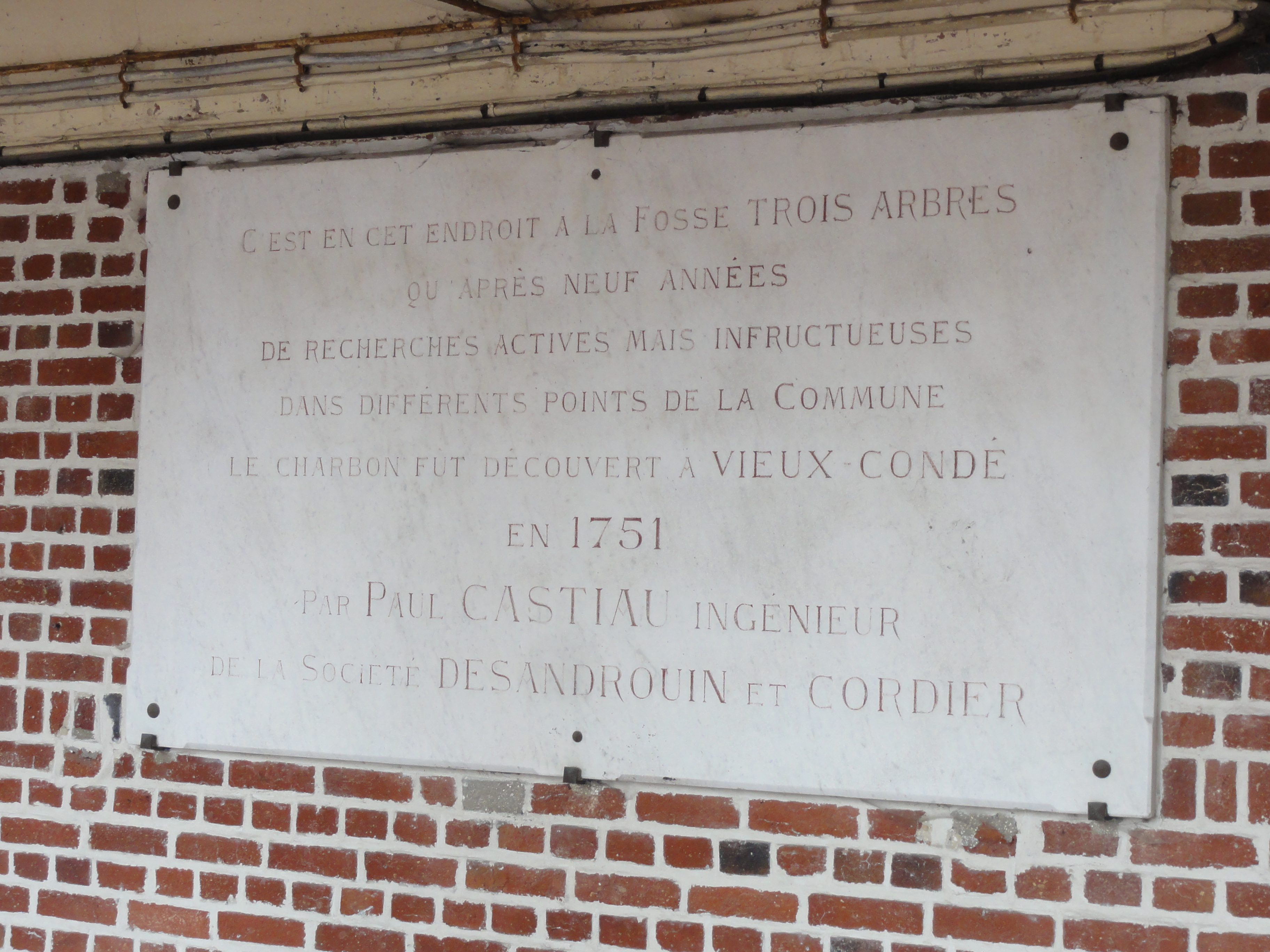 La Fosse Trois Arbres de la Compagnie des mines d'Anzin était un charbonnage constitué de deux puits situé à Vieux-Condé, Nord, Nord-Pas-de-Calais, France.